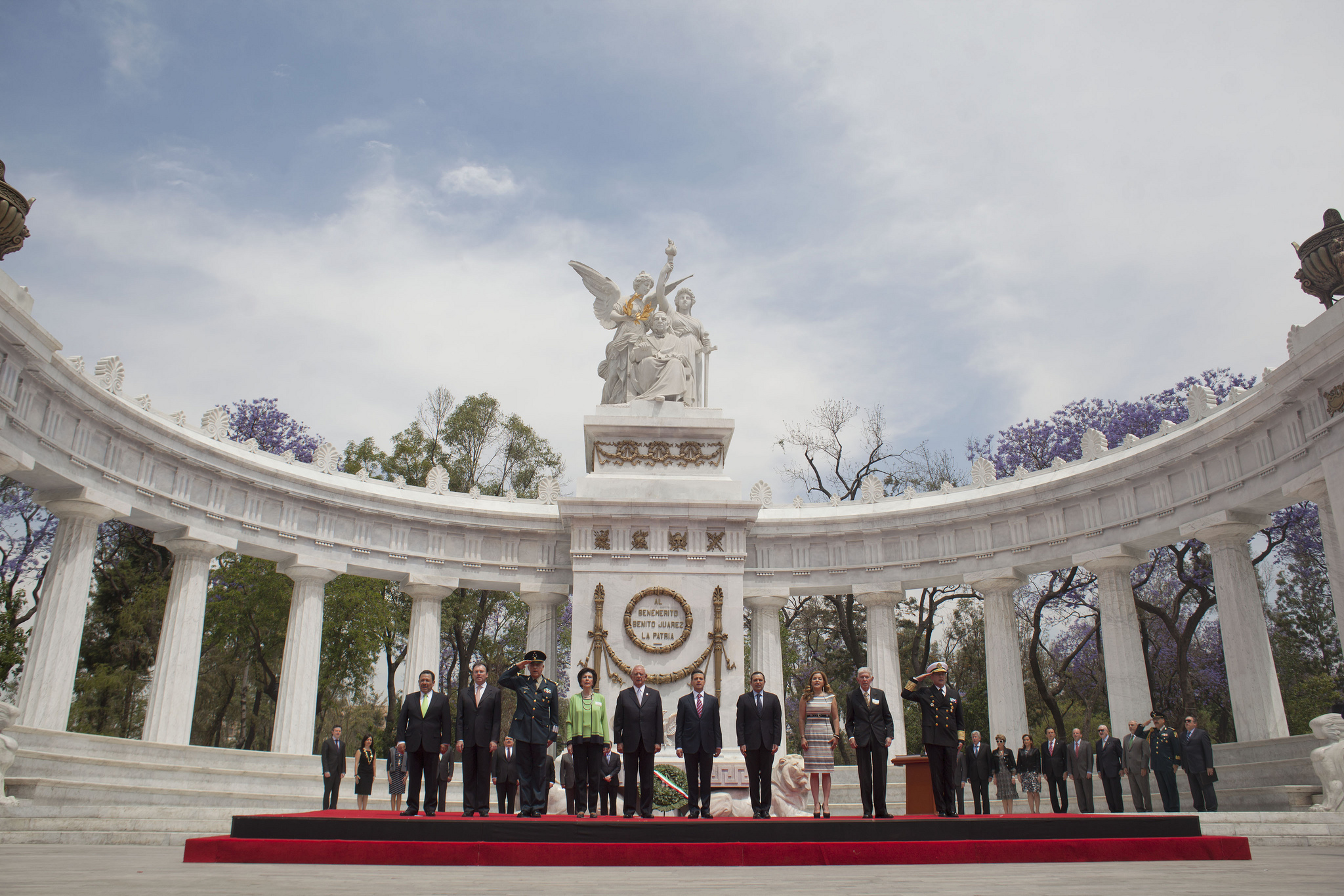 207 Aniversario del Natalicio del Licenciado Benito Juárez García. Hemicíclo a Juárez en la Alameda Central. 21 marzo 2013